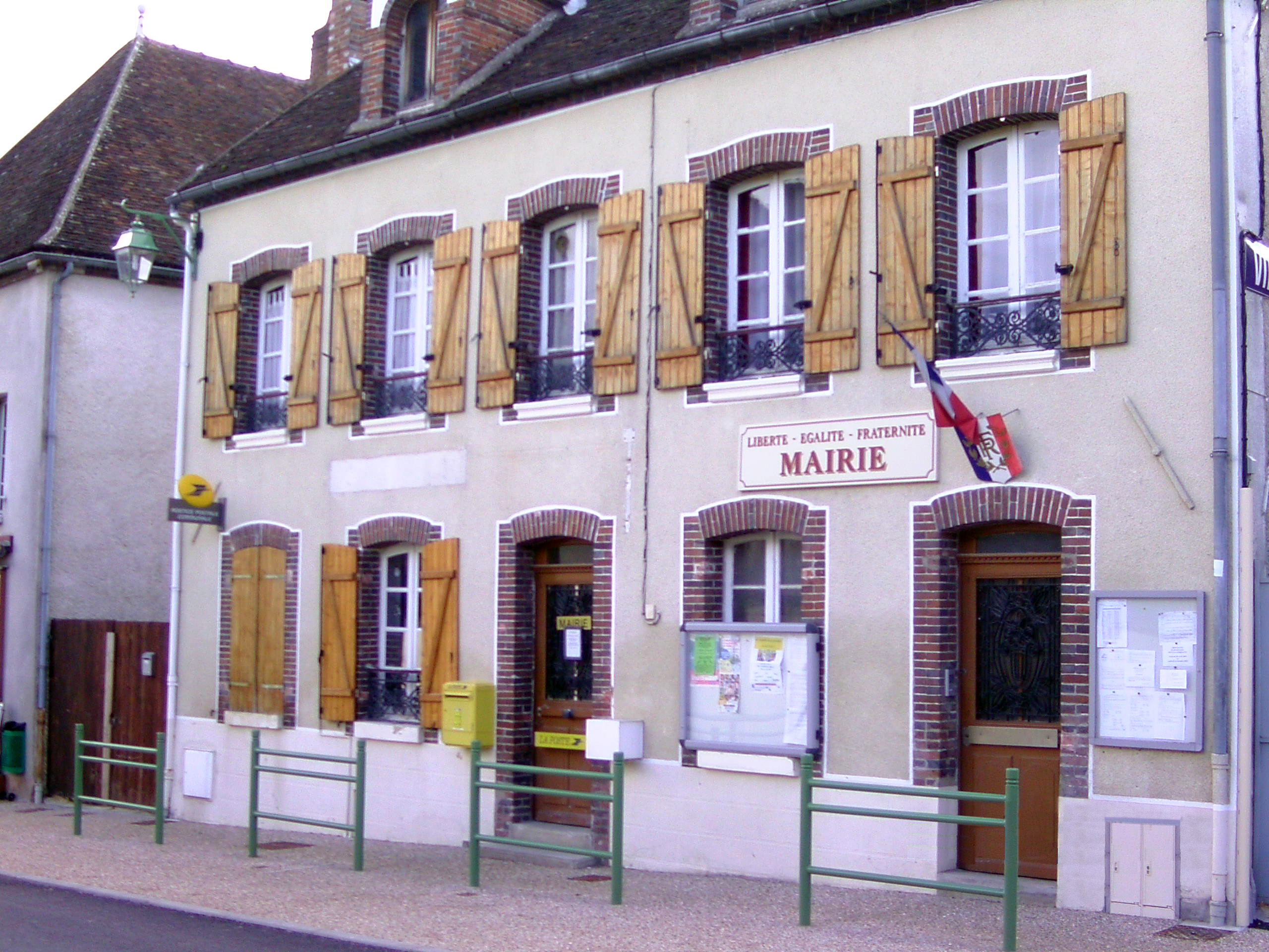 Il s'agit de la toute petite mairie de Villevallier (89) qui partage l'immeuble avec la poste